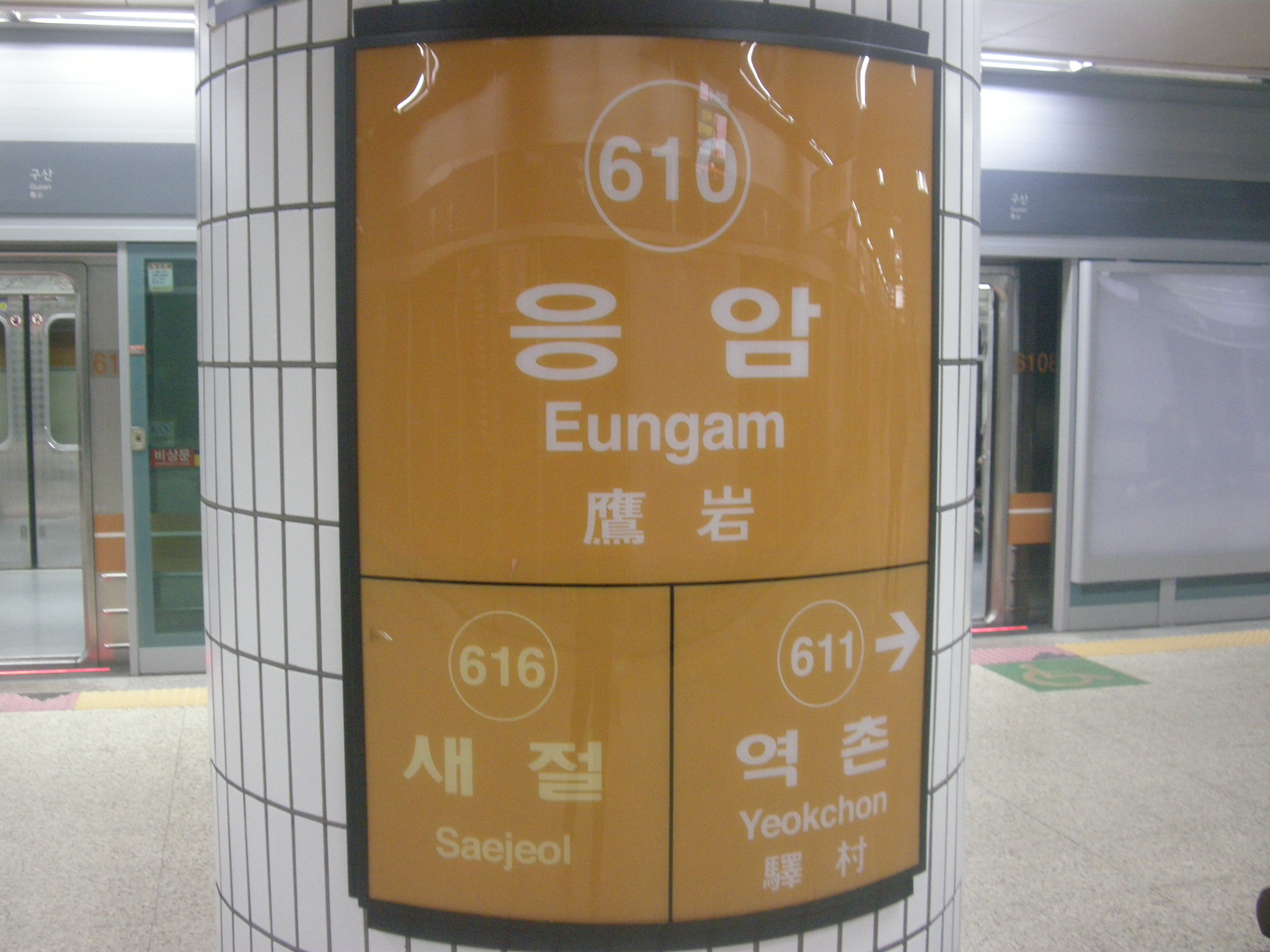 서울 지하철 6호선 응암역 응암 방면 직사각형 역명판